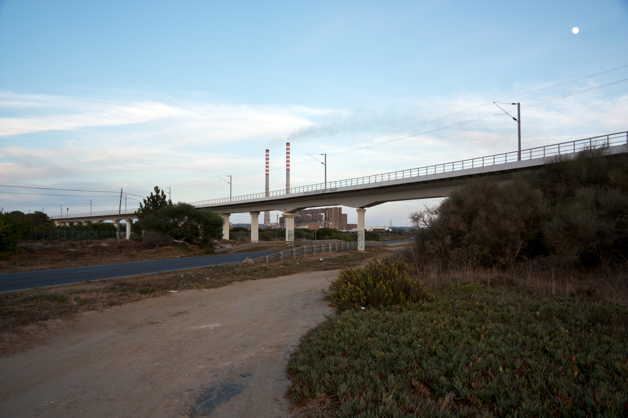 Via férrea: Linha de Sines [PK 177] Local: Sines Data e hora: 28 de Agosto de 2012 [19h55] Sentido: Ermidas • Sado